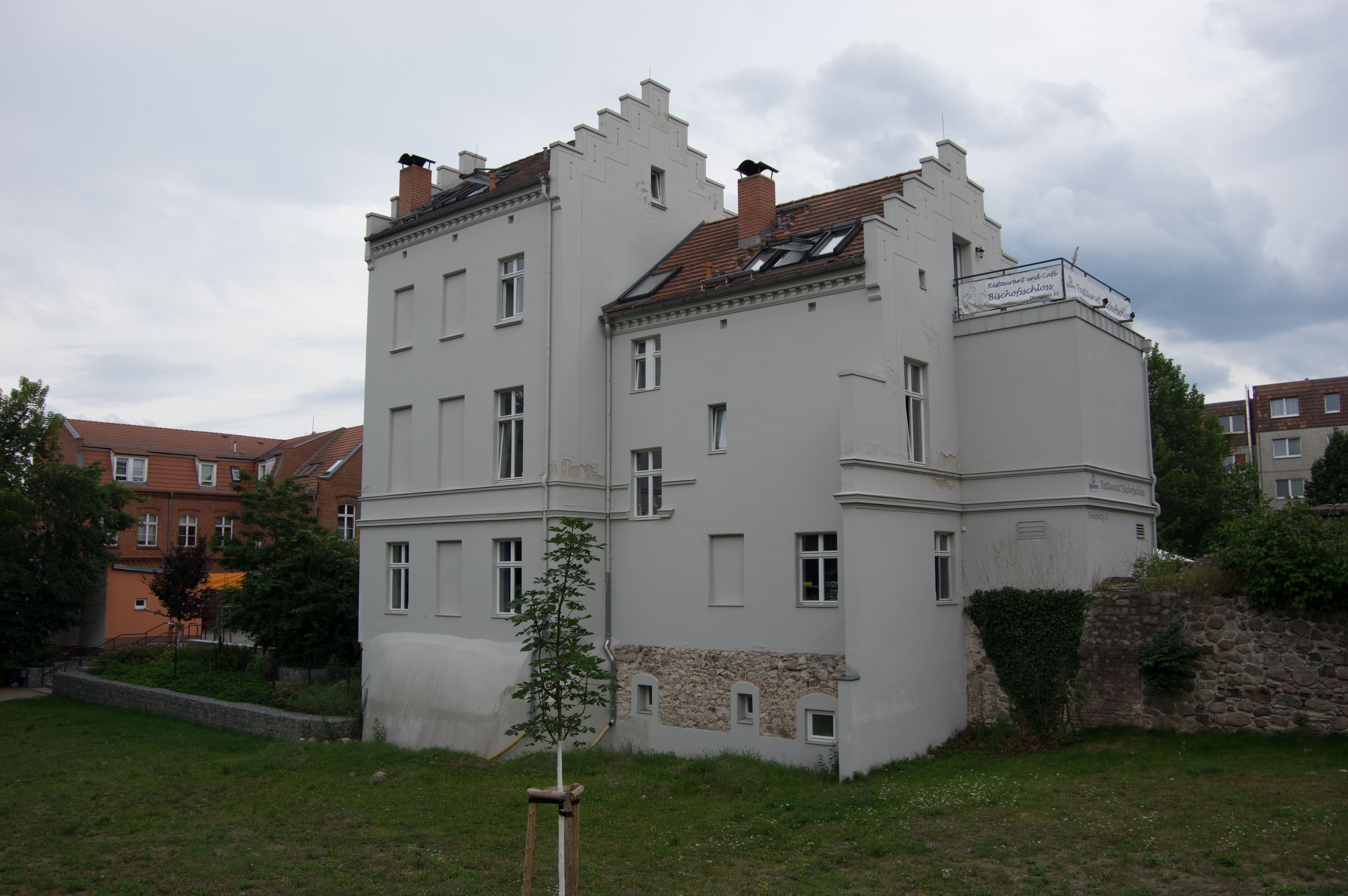 Fürstenwalde/Spree in Brandenburg. Das Gebäude / Denkmal auf dem Bild ist denkmalgeschützt.